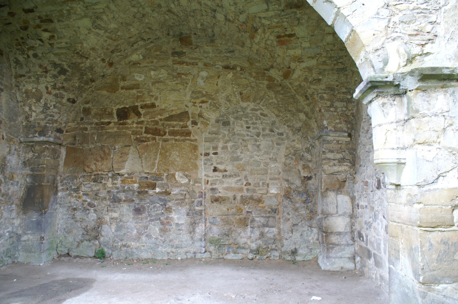 Ruine der Stiftskirche Walbeck (Ohrekreis)